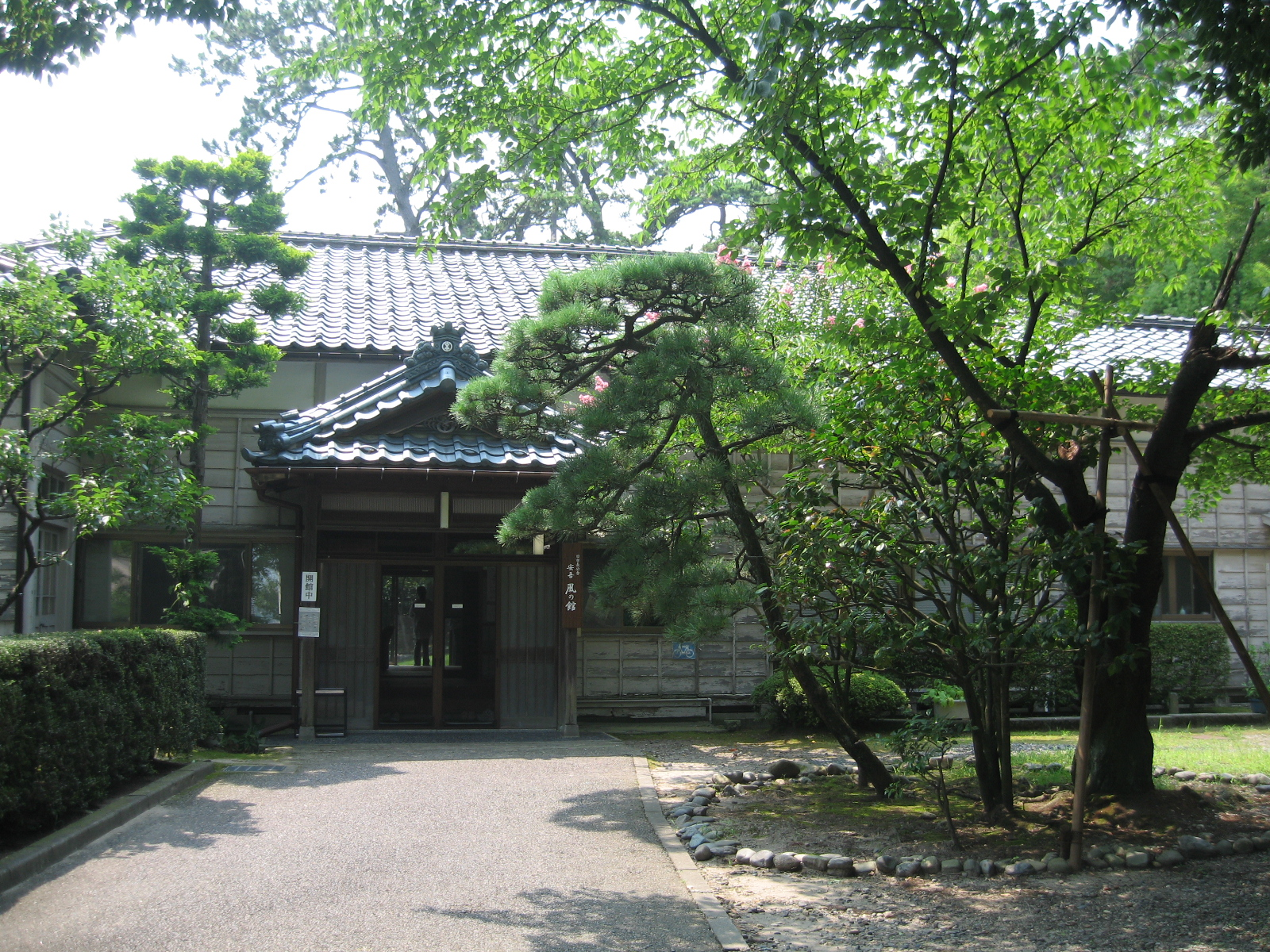 新潟市中央区。「安吾 風の館」の画像。